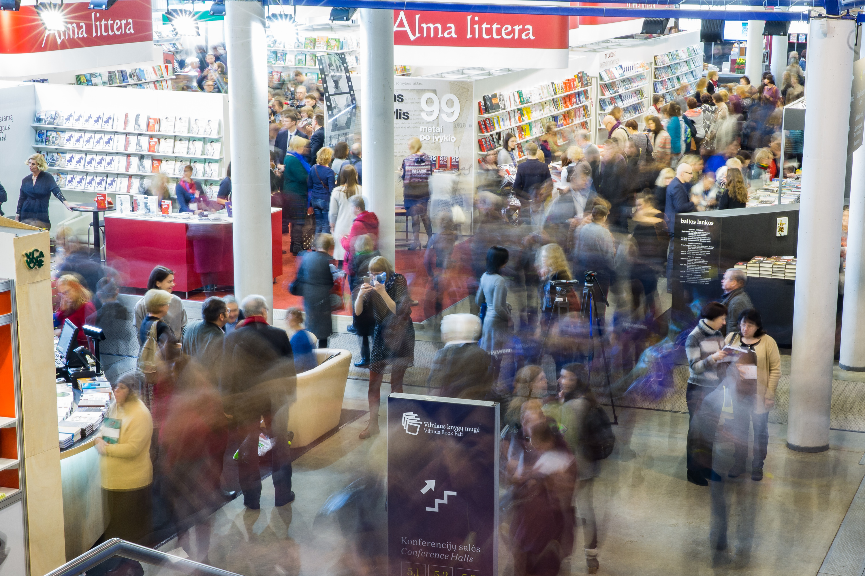 Vilniaus knygų mugė 2018